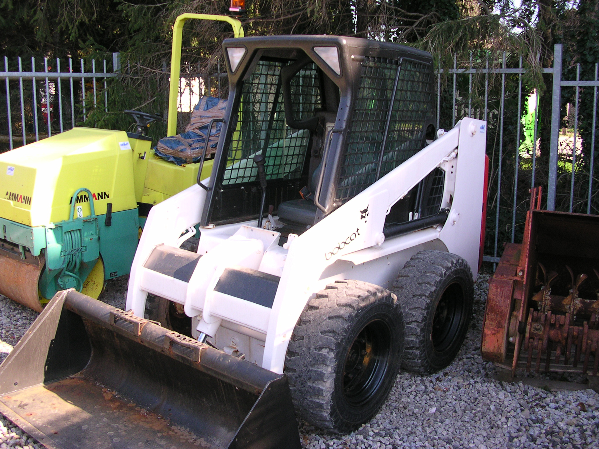 Bobcat Kompaktlader S 130, Kubota 4-Zylinder-Dieselmotor, Max. Leistung 34,3 kW (bei 2800 U/min), Drehmoment 150 Nm (bei 1700 U/min), fahrbare Nutzlast 590 Kg, Höchstgeschwindigkeit 12 km/h